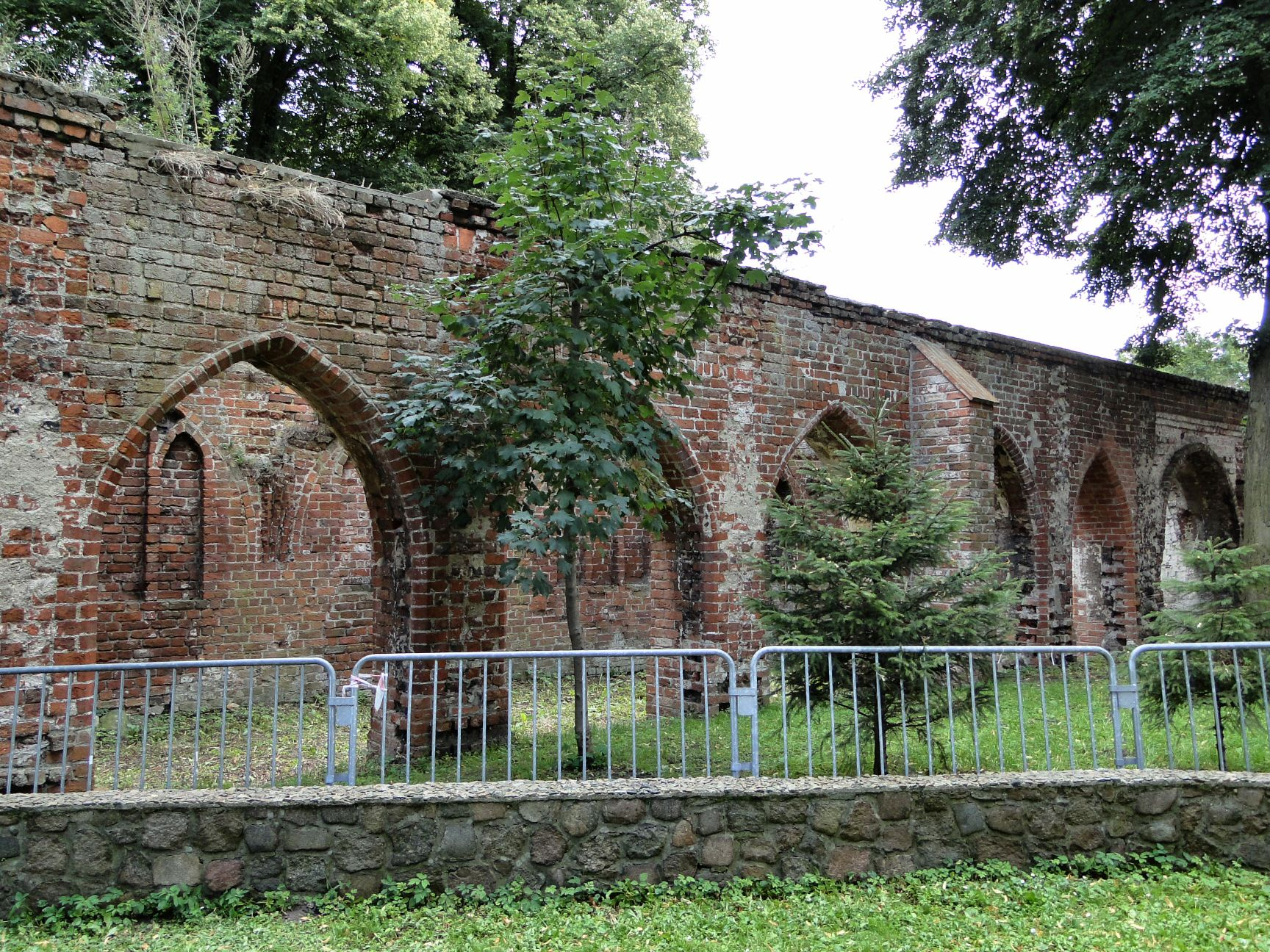 Ruiny klasztoru augustianów w Policach Jasienicy